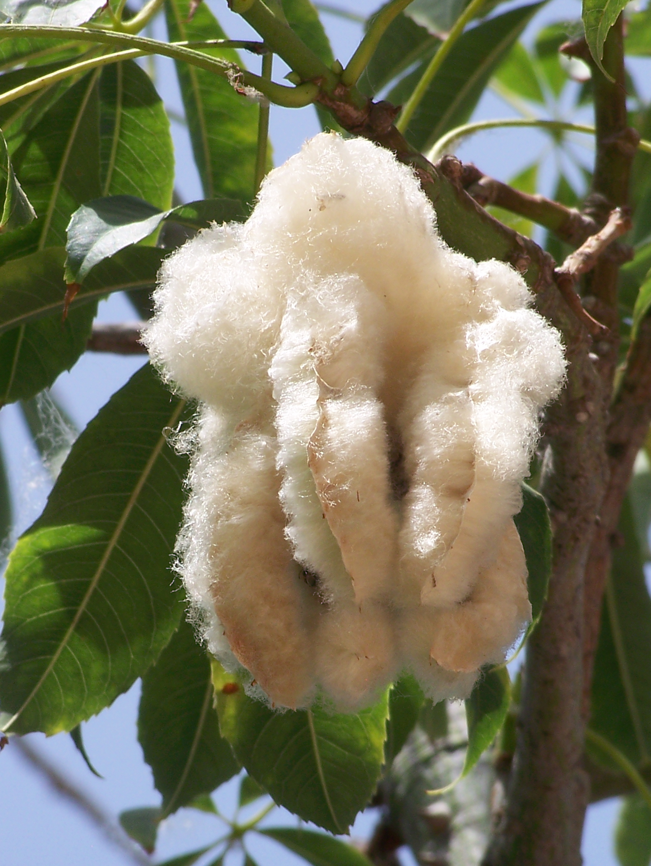 Ceiba speciosa : fruto maduro y abierto - El Placetón, Águilas (Provincia de Murcia, España).